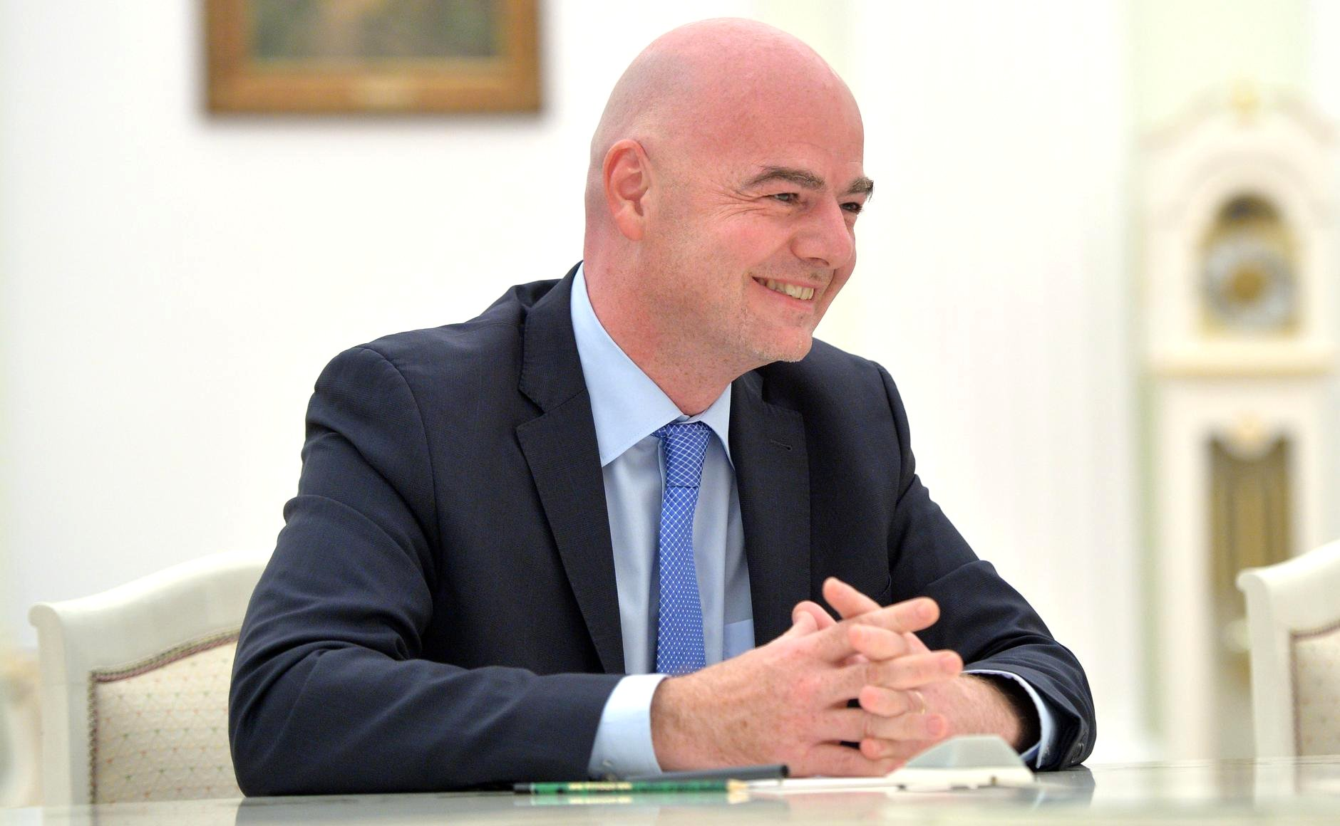 Президент ФИФА Джанни Инфантино во время встречи с президентом России Владимиром Путиным